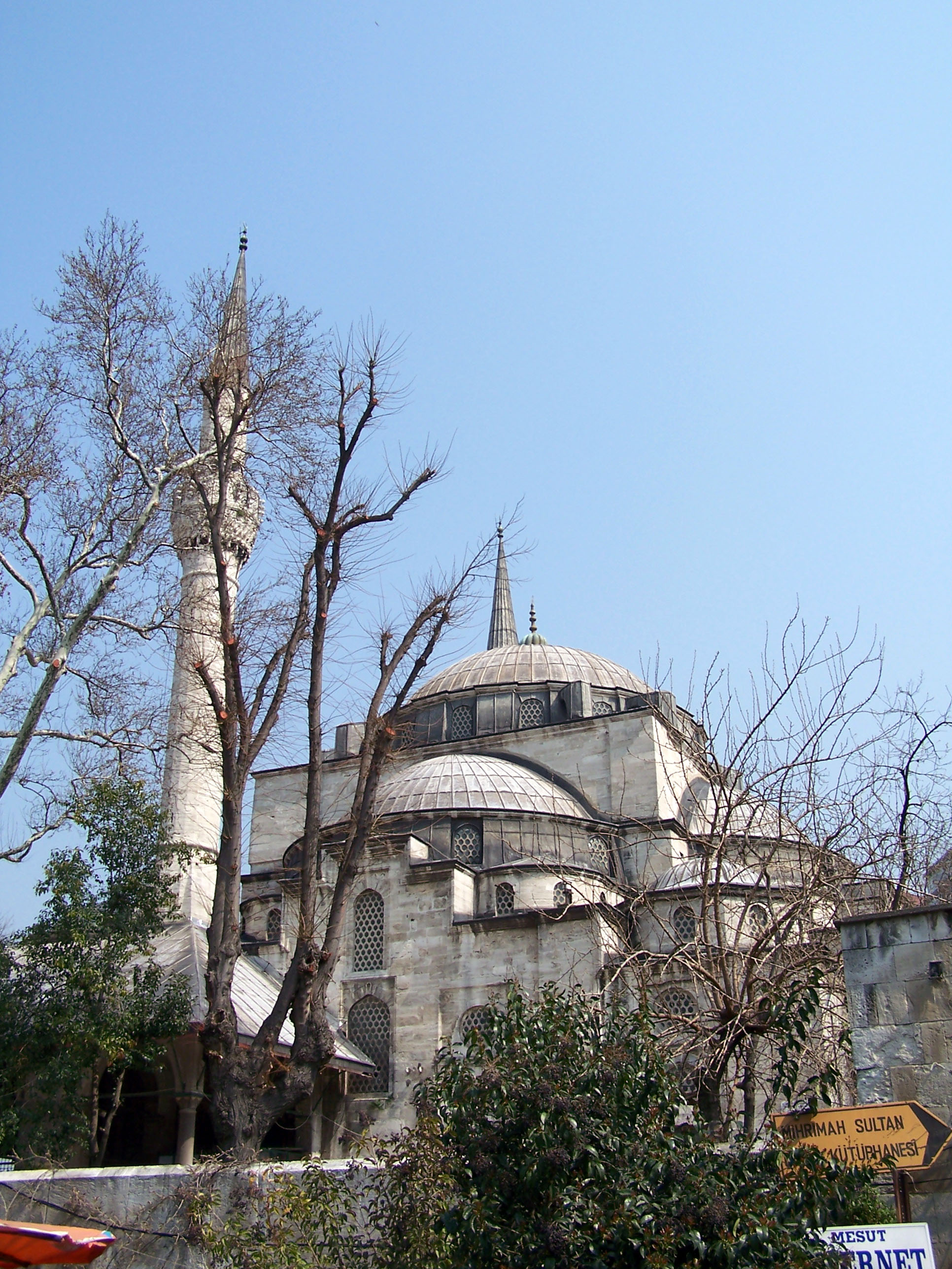 Mihrimah Sultan Camii in Üsküdar, İstanbul, Turkey